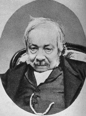 Giuseppe Alinovi (1790-1869), musicista e compositore parmigiano.